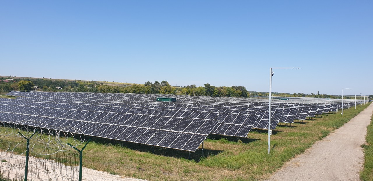 Кировоградская область, мощность 9,9 МВт